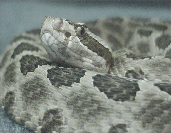 Western Massasauga, Sistrurus catetanus tergeminus